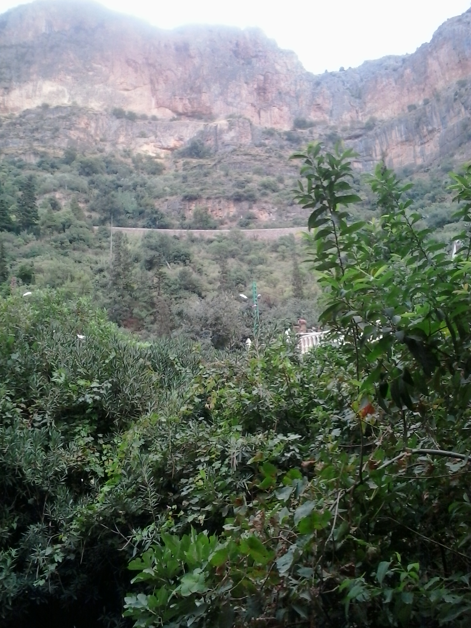 La région d´el ourit Tlemcen